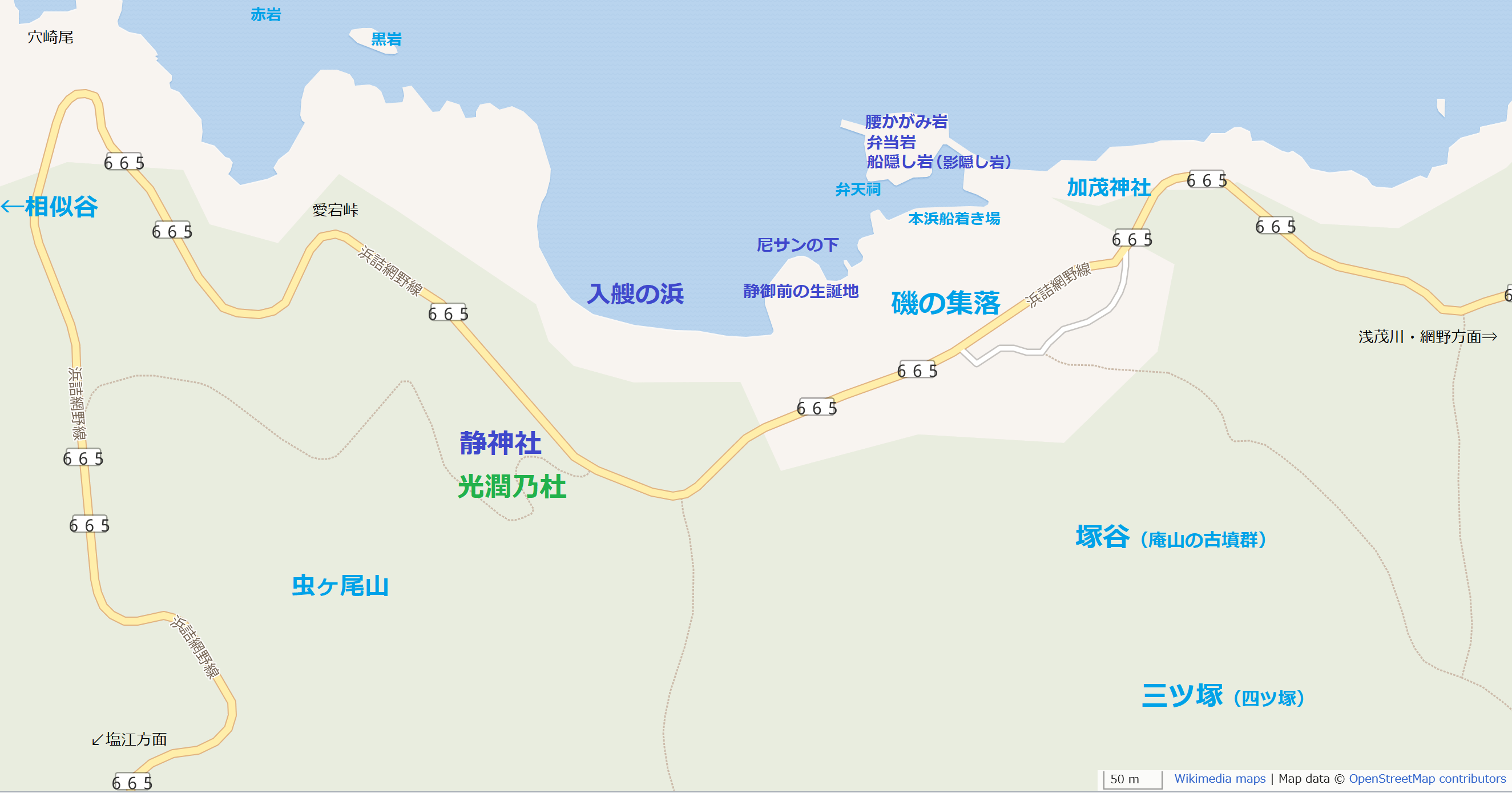 京丹後市網野町磯区内地図。 オープンストリートマップ(地図中心座標: 35.687353, 134.990583)に漱石の猫がポイントを付記。 This map may be incomplete, and may contain errors. Don't rely solely on it for navigation.